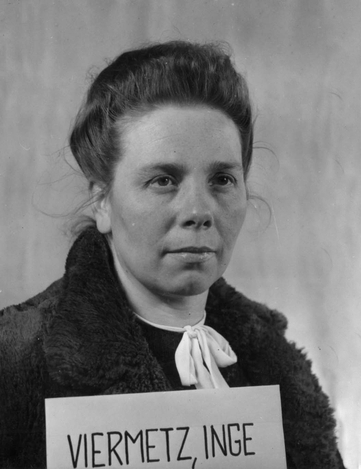 Inge Viermetz (* 7. März 1908 in Aschaffenburg; † unbekannt) war eine deutsche Abteilungsleiterin beim Lebensborn e.V. zur Zeit des Nationalsozialismus. Viermetz wurde im Rahmen der Nürnberger Prozesse im Prozess Rasse- und Siedlungshauptamt der SS am 1. Juli 1947 mit 13 weiteren Beschuldigten angeklagt und am 10. März 1948 freigesprochen